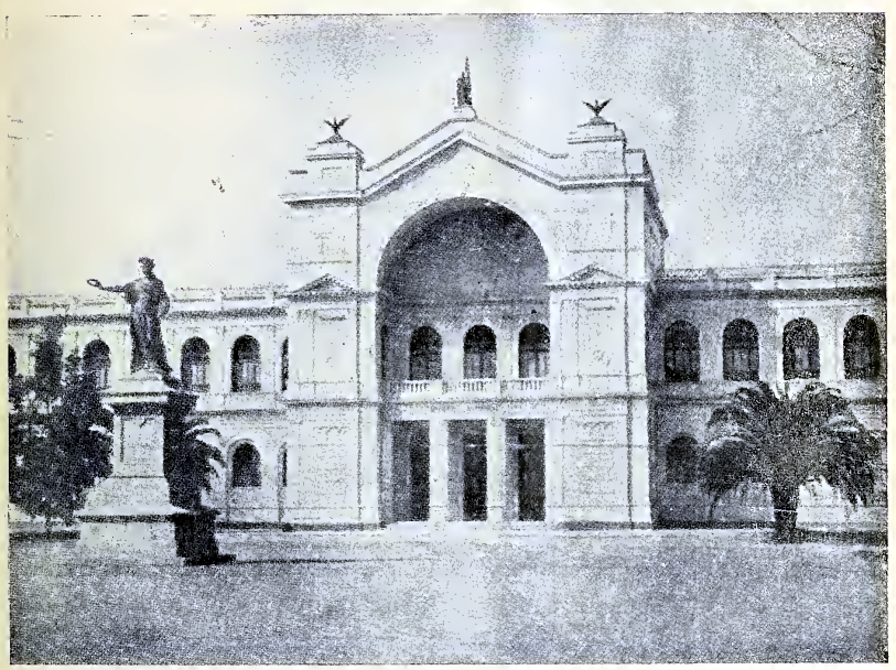 "Museo Nacional" p. 287 El Museo Nacional de Historia Natural de Chile antes de 1910